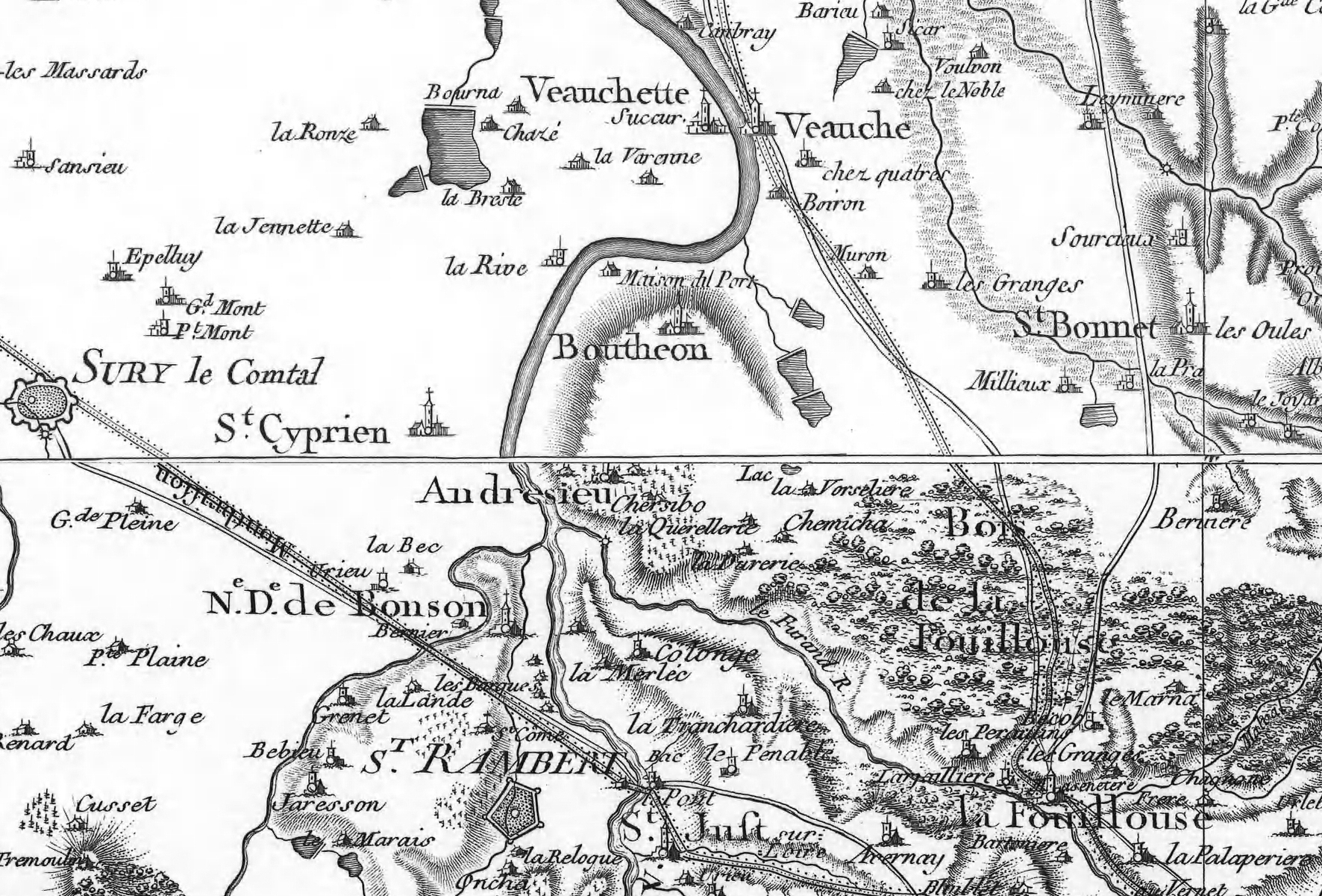 Carte de Cassini : extrait montrant la région de Andrézieux-Bouthéon Libre de droits (carte publiée au XVIIIe siècle)